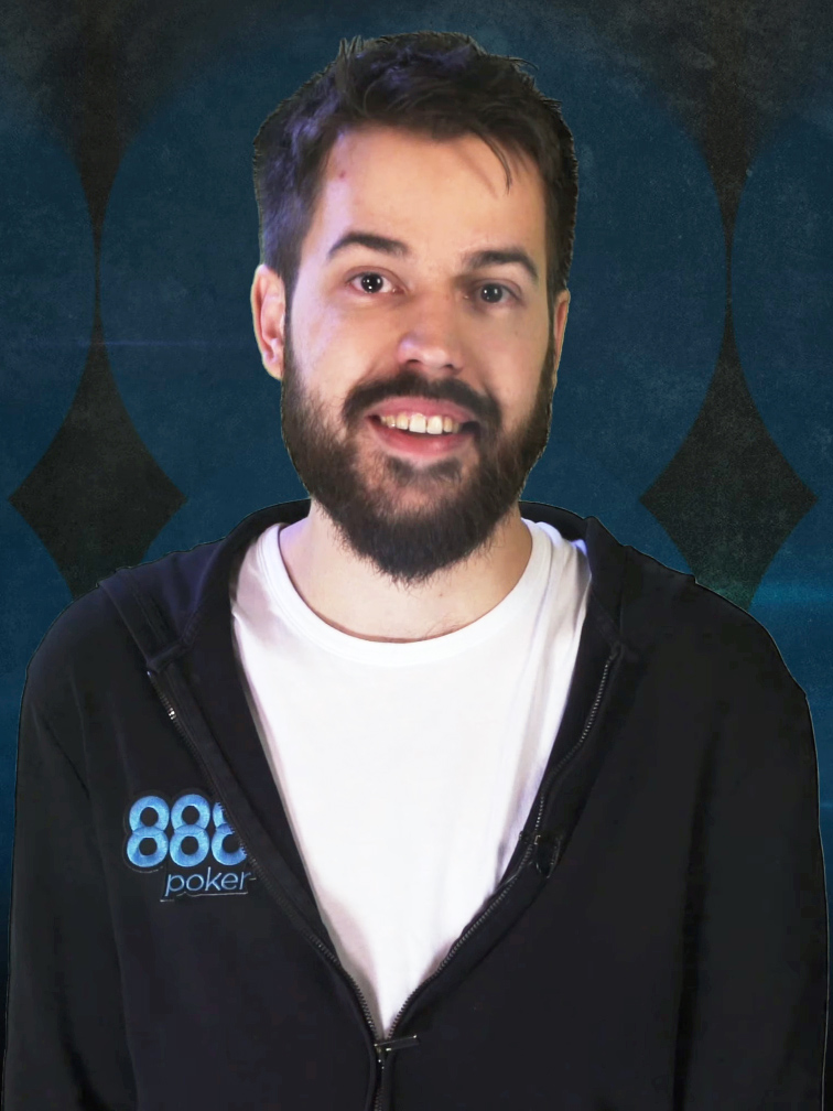 Dominik Nitsche vor dem Super High Roller Bowl V